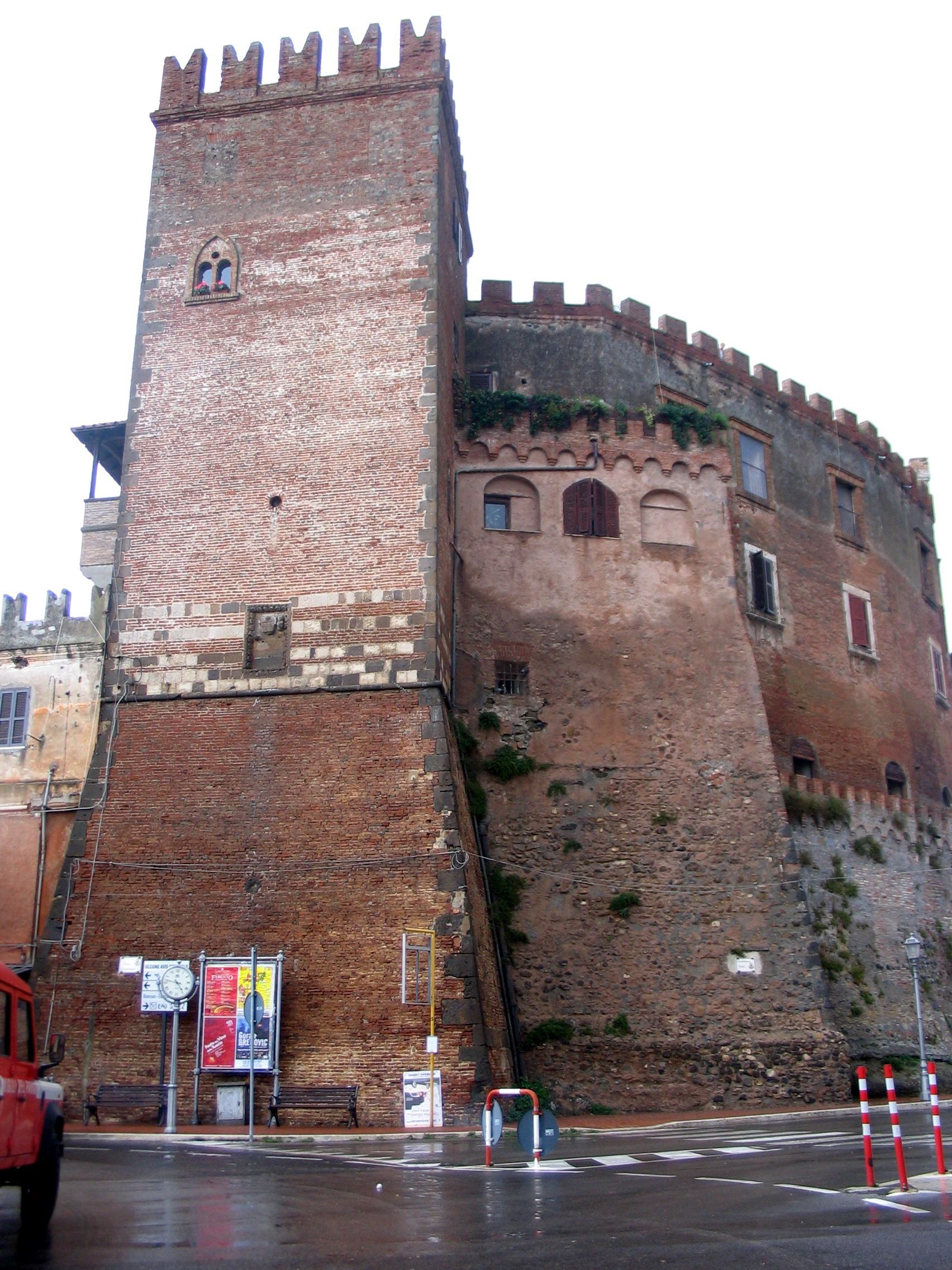 Montalto di Castro, Lazio, Italia